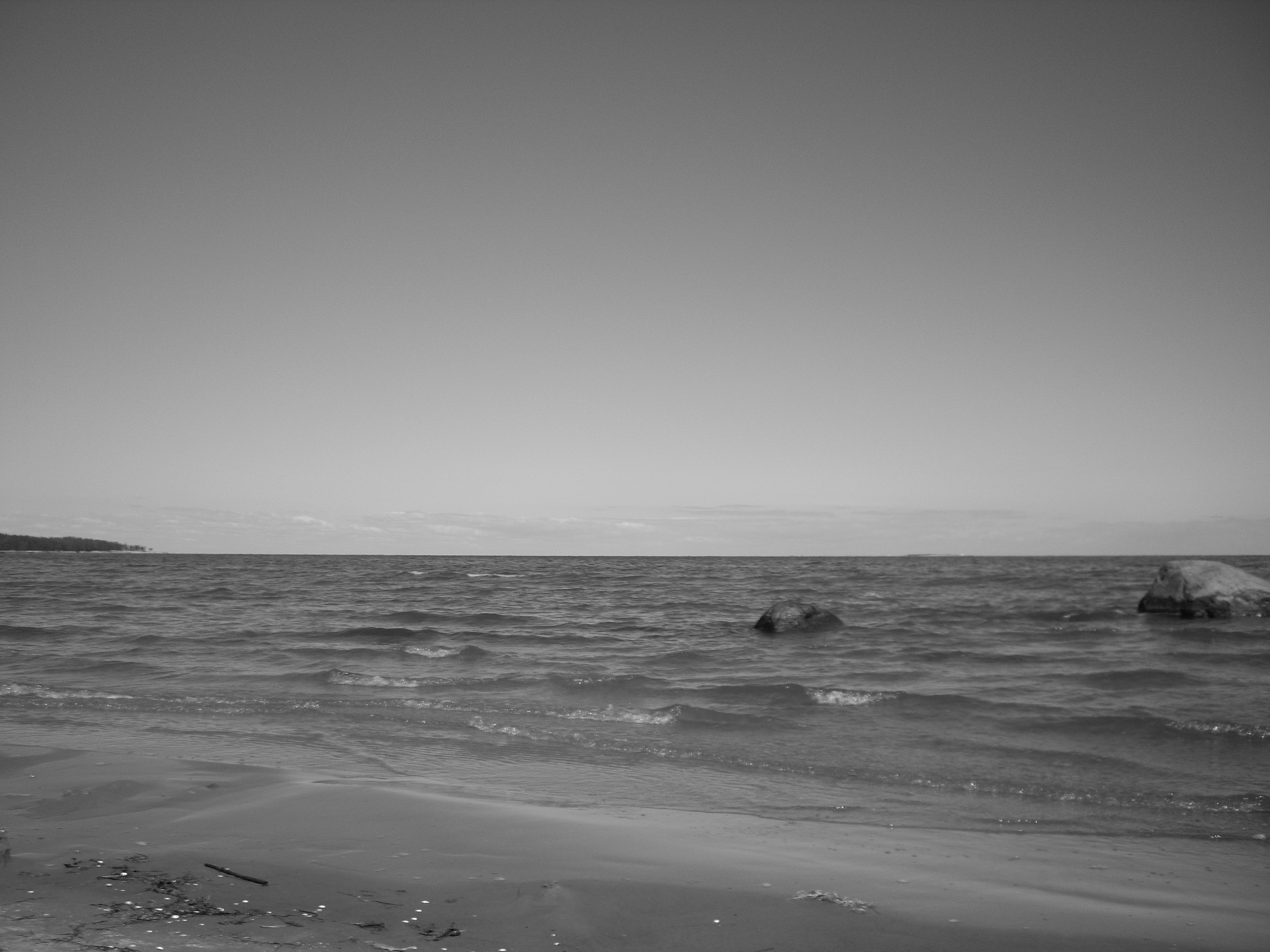 Pihlaspea rand